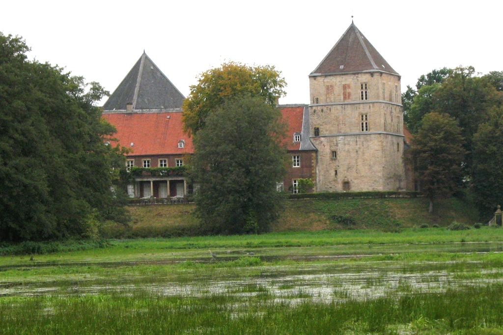 Schloss Rheda in Rheda-Wiedenbrück, Blick über die Emswiesen